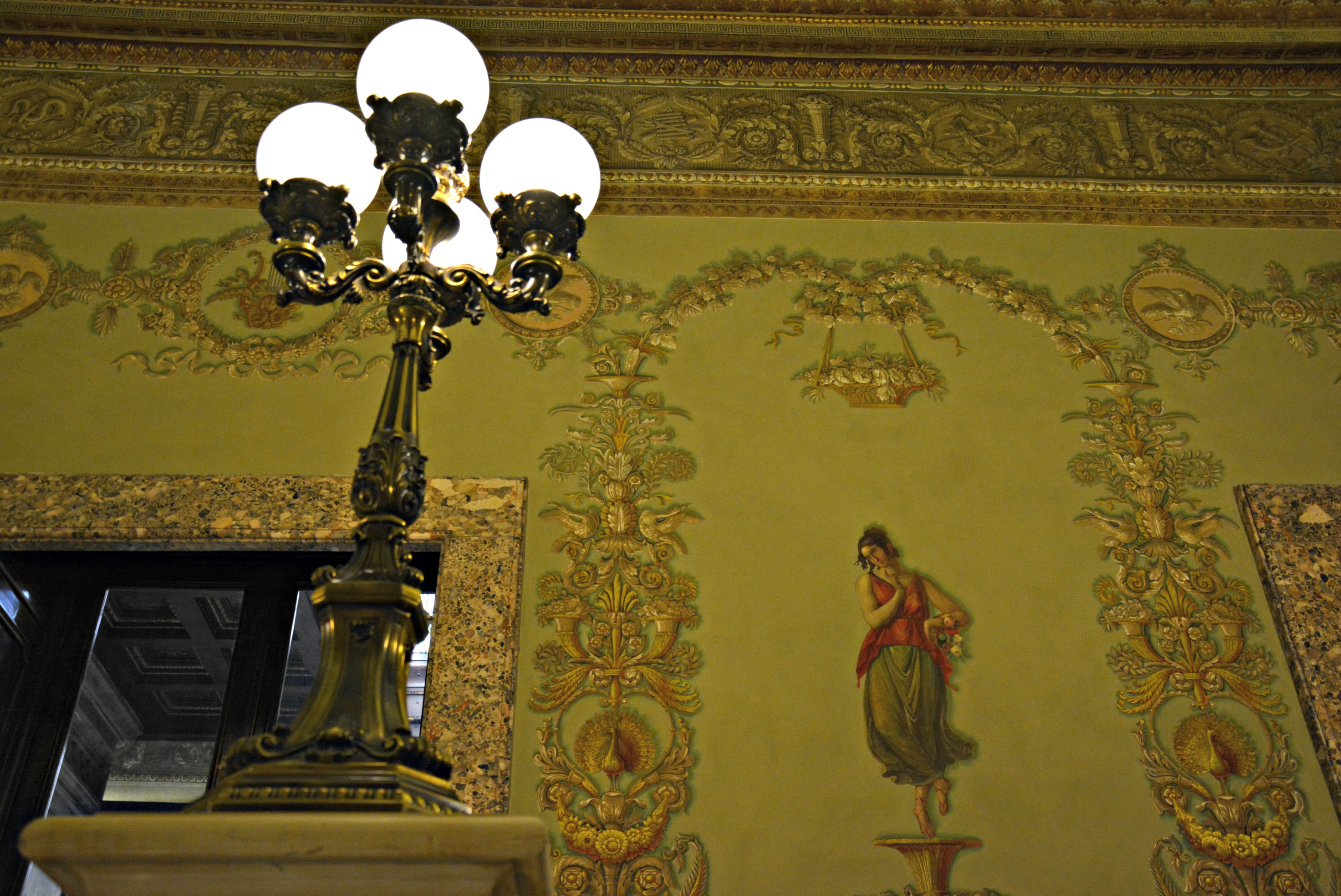 Palazzo Zevallos a Napoli